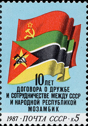 Почтовая марка СССР, выпущенная 25 июня 1987 года и посвящённая 10-летию Договора о дружбе и сотрудничестве между СССР и Народной Республикой Мозамбик. На марке изображены Государственные флаги СССР и Народной Республики Мозамбик. Художник — Ю. Бронфенбренер. Номер (ЦФА) — 5845. Тираж — 2,0 млн экз.